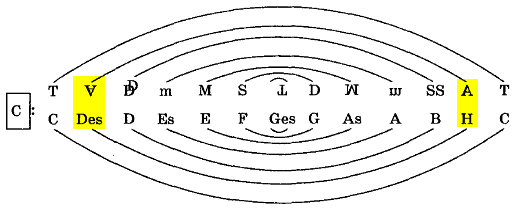 Функции расширенной тональности (схема с выделенными атактами)